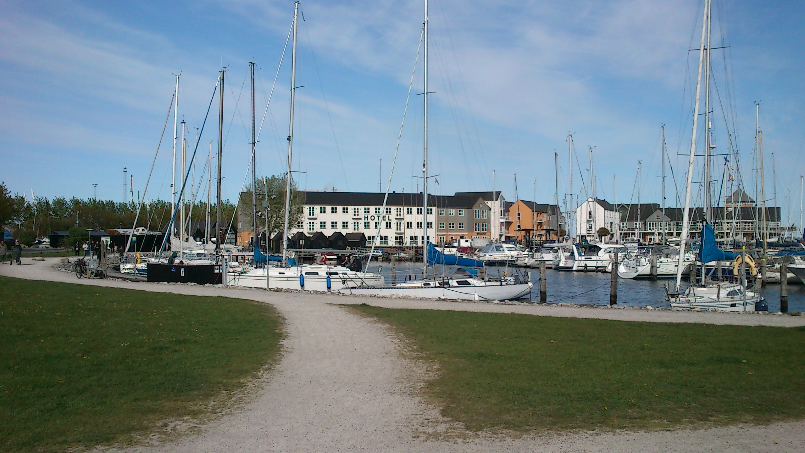 Marselisborg Lystbådehavn